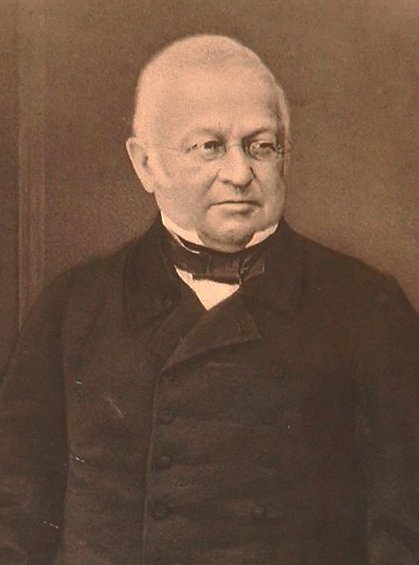 Adolphe Thiers (1797-1877) d'après portrait officiel (Pierre Petit photographe)